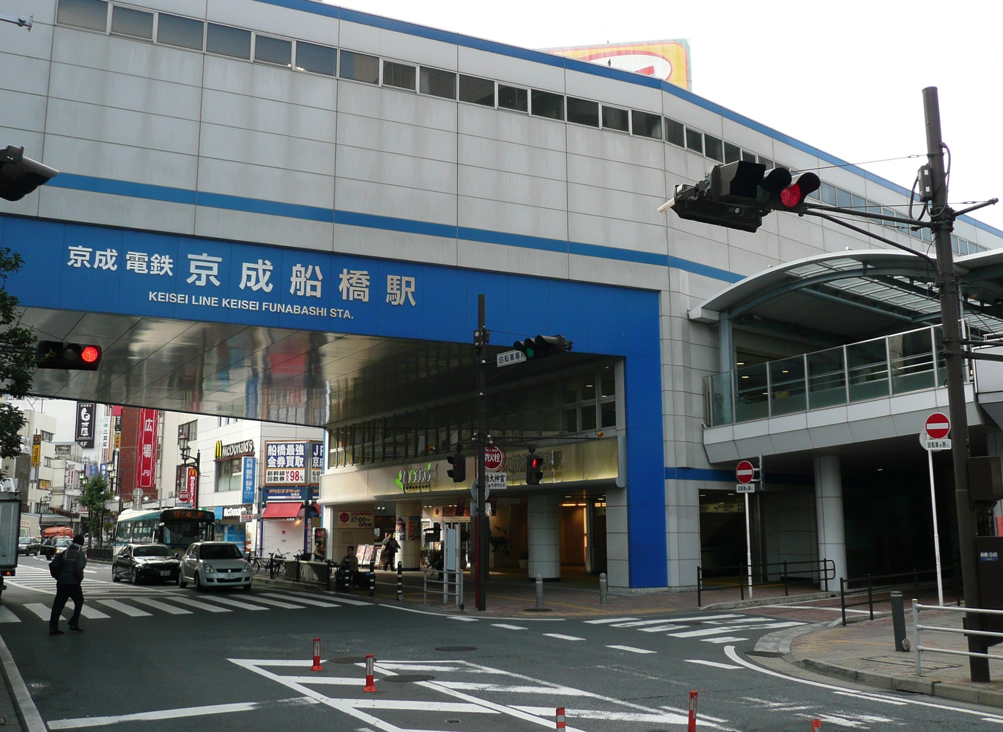 京成船橋駅